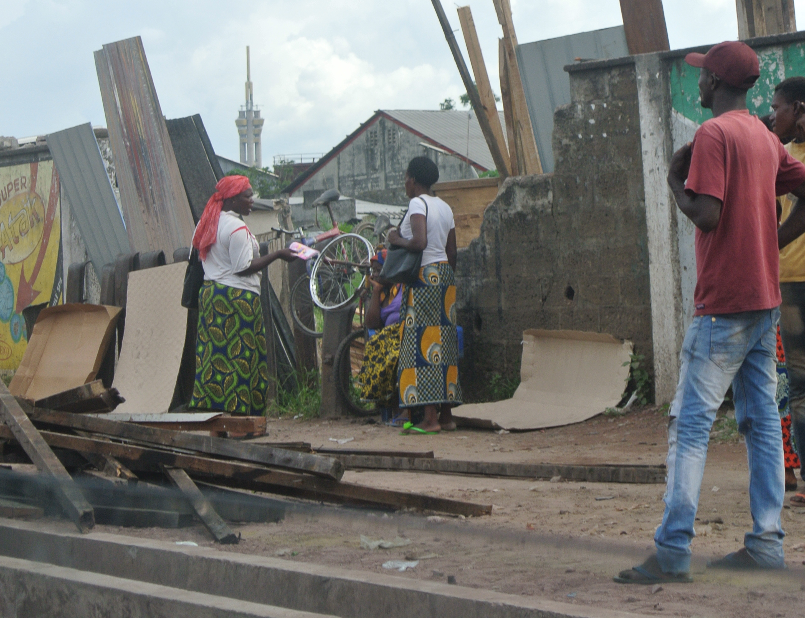 Kinshasa, République Démocratique du Congo - 2013